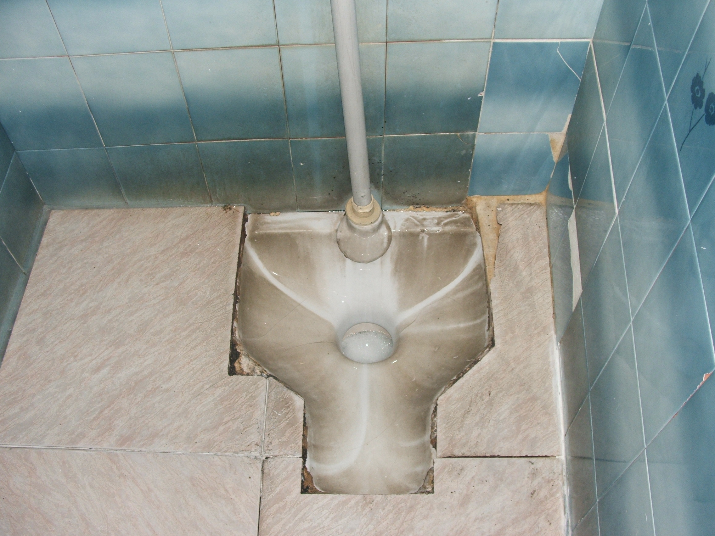 Sin duda la más atrevida, rara y controvertida de mis imágenes. Es la foto del único váter sin taza que he visto en mi vida, que, además, no es un inodoro japonés o un inodoro a la turca. Si alguien tiene una foto de un retrete similar, por favor, que me lo comunique en mi página de discusión y me pase el enlace de la imagen.